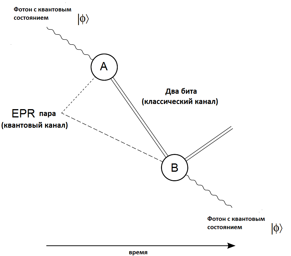 Диаграмма квантовой телепортации фотона